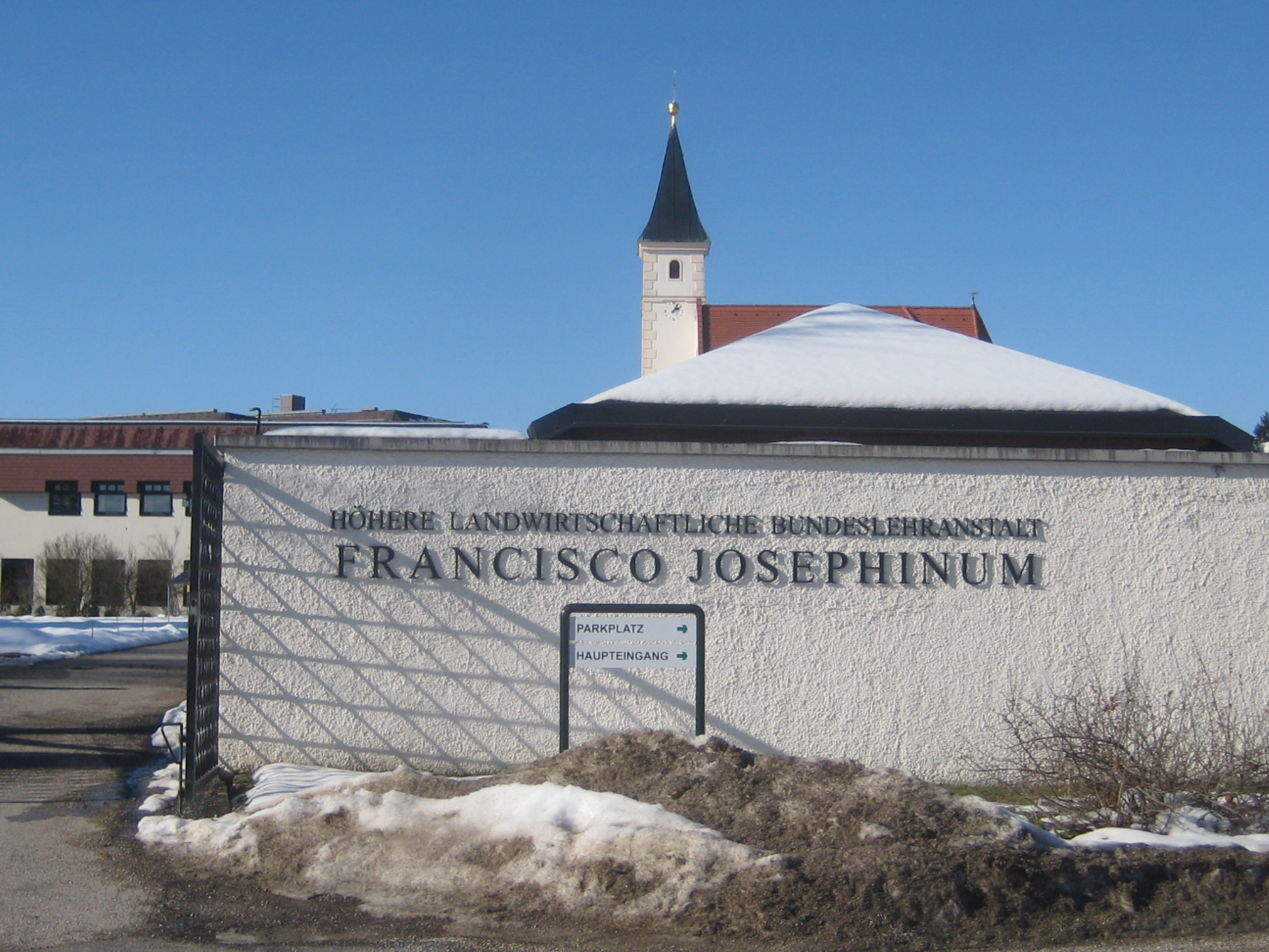 unterer nebeneingang zum fransisco josephinum in weinzierl, wieselburg